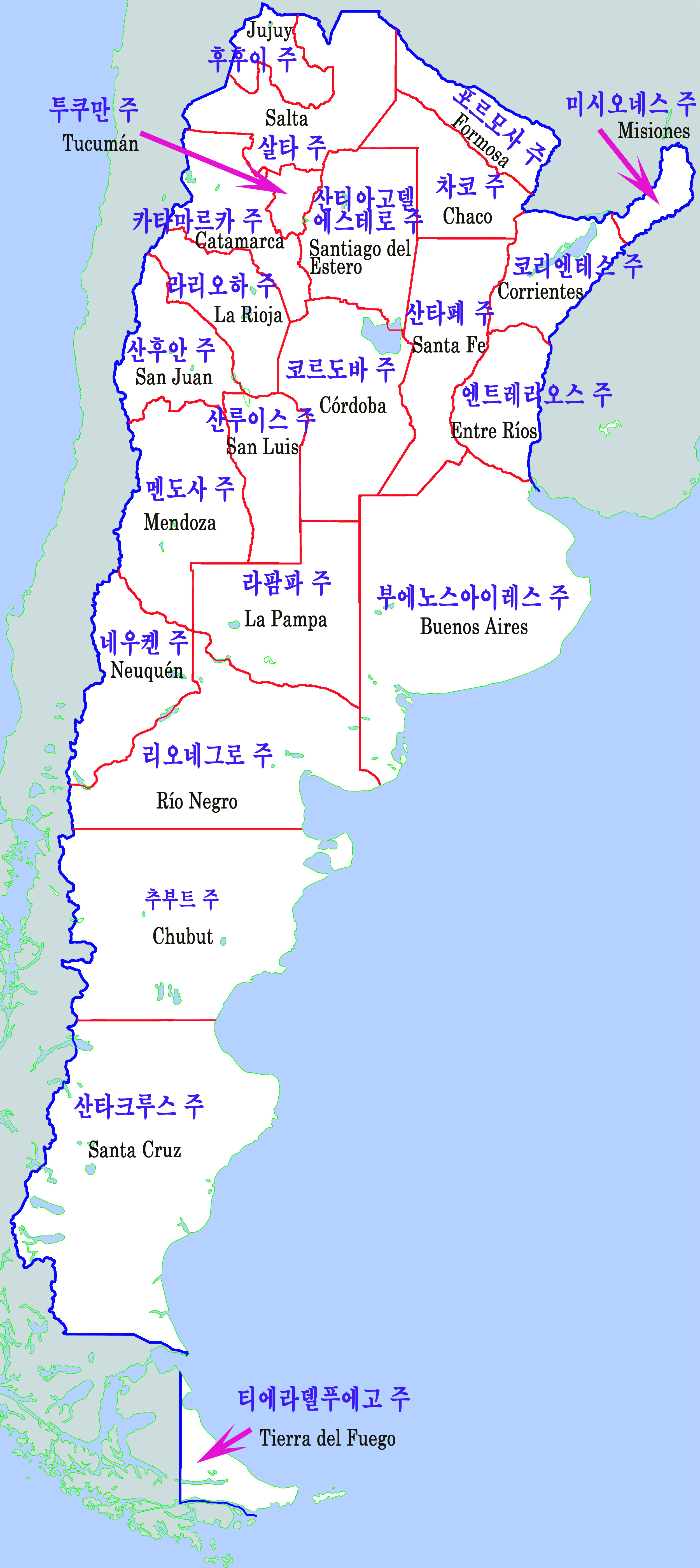 아르헨티나 행정구역ㅎ